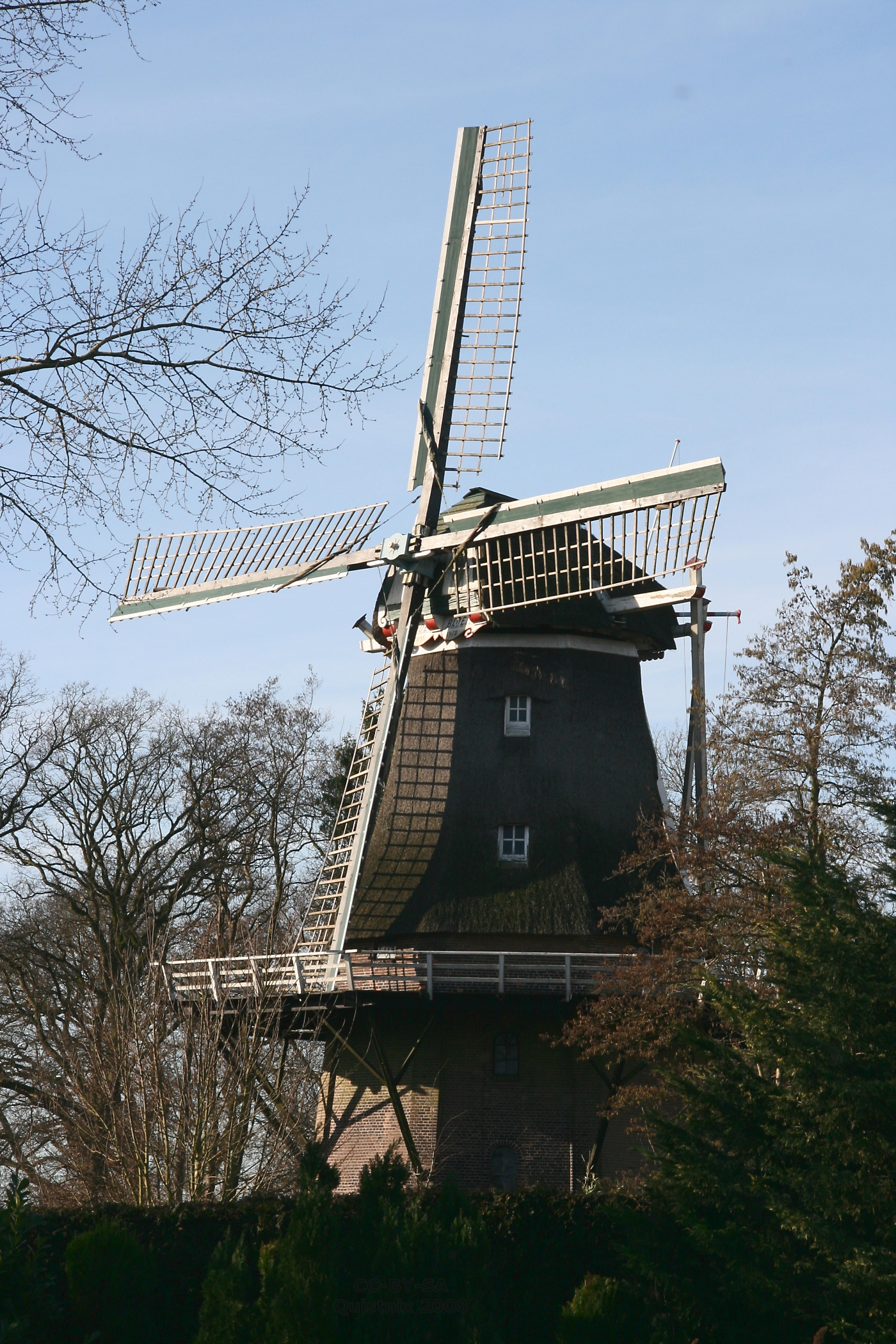 Erica: Molen De Heidebloem, gezien vanuit de de tuin van een nabijgelegen huis (Met dank aan de behulpzame bewoners en de mensen in de doe-het-zelf winkel, die mij spontaan een ladder aanboden om op te klimmen om deze foto te maken.) De Heidebloem windmill. Erica, Drenthe, seen from garden of nearby house, "with special thanks to the owners and the the people of the DIY store who spontaneously offered me a ladder to take this picture".